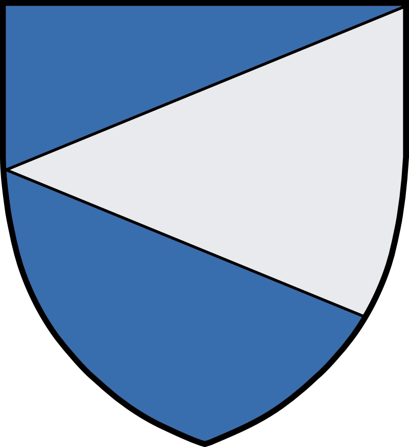 Vapensköld för ätten Gren från Östergötland